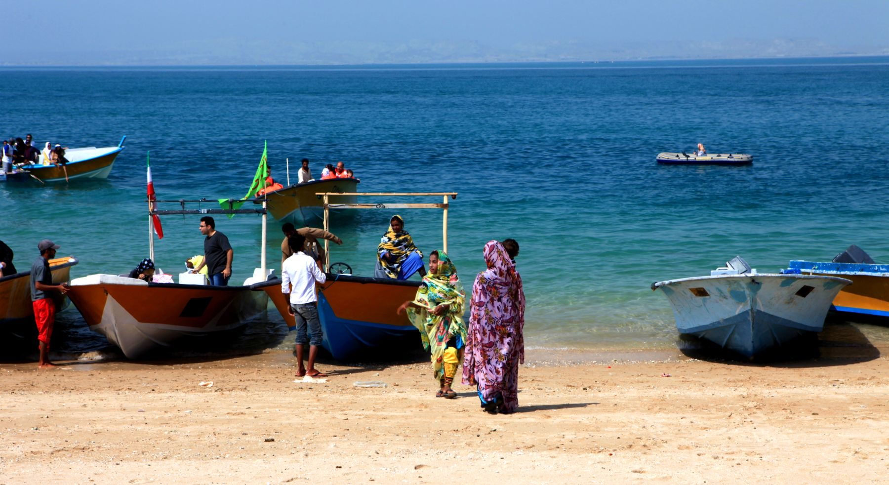 Qeshm, Hengam Island, Persian Gulf, Iran